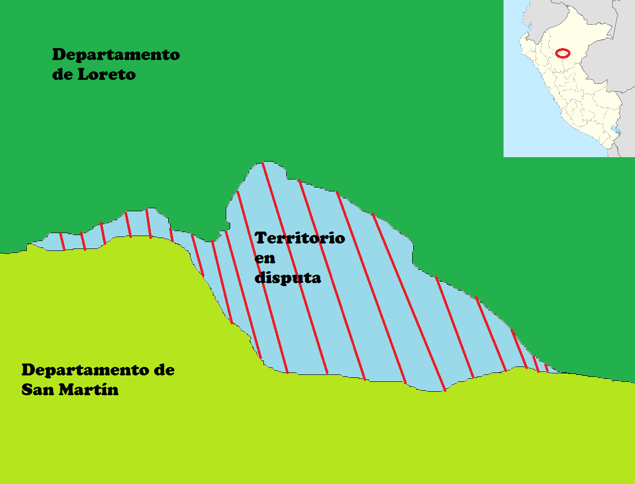 Territorio en disputa entre las regiones de San Martín y Loreto